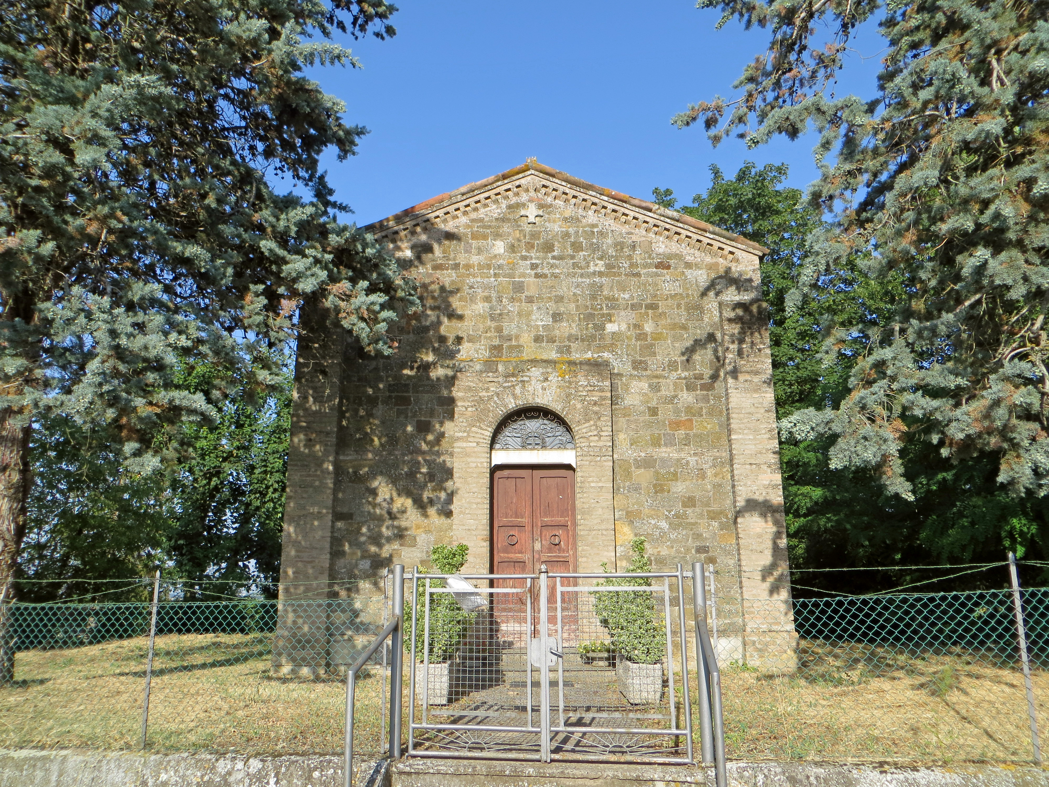 Oratorio di San Geminiano (Vignale, Traversetolo) - facciata